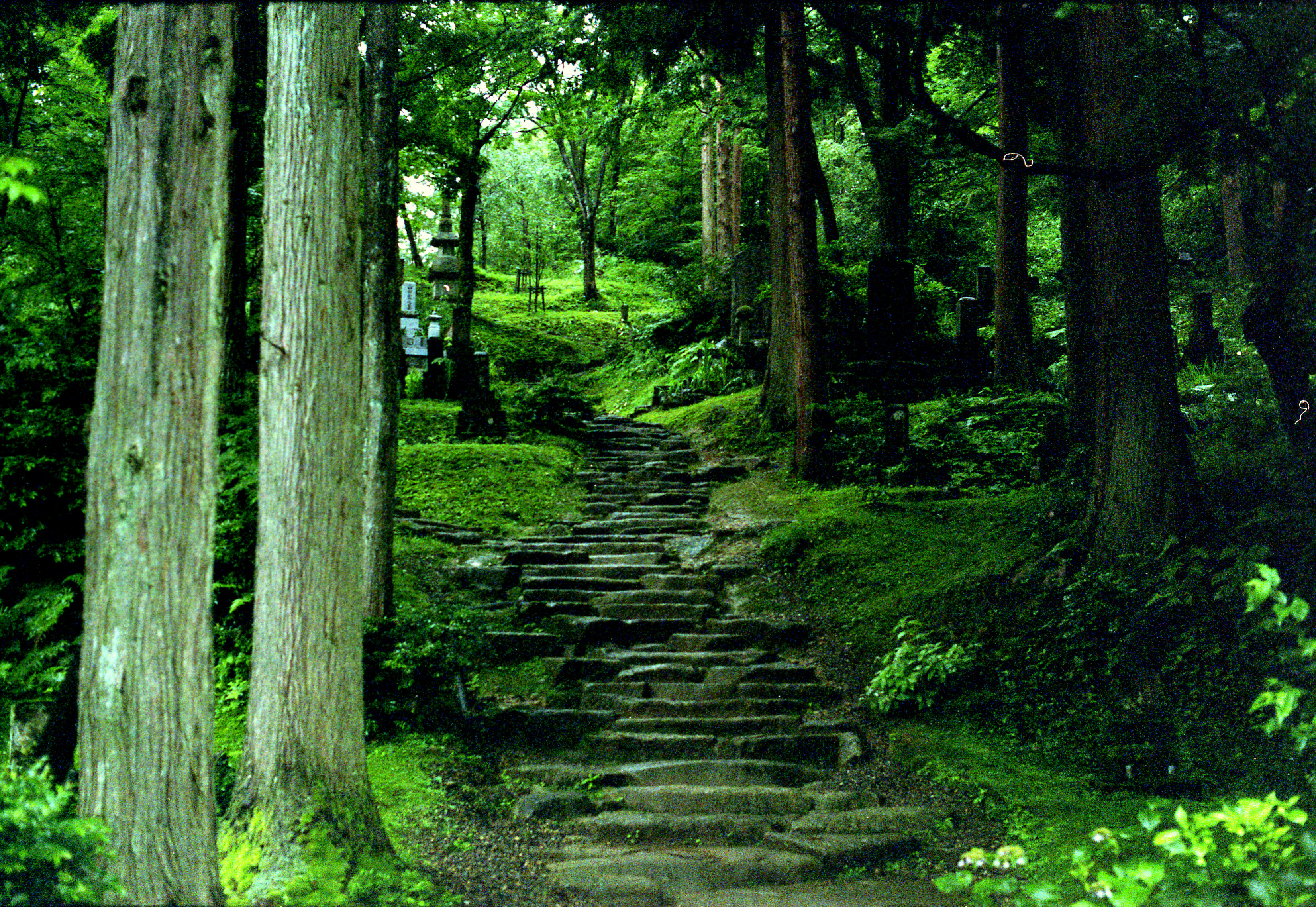 上杉謙信墓所／林泉寺